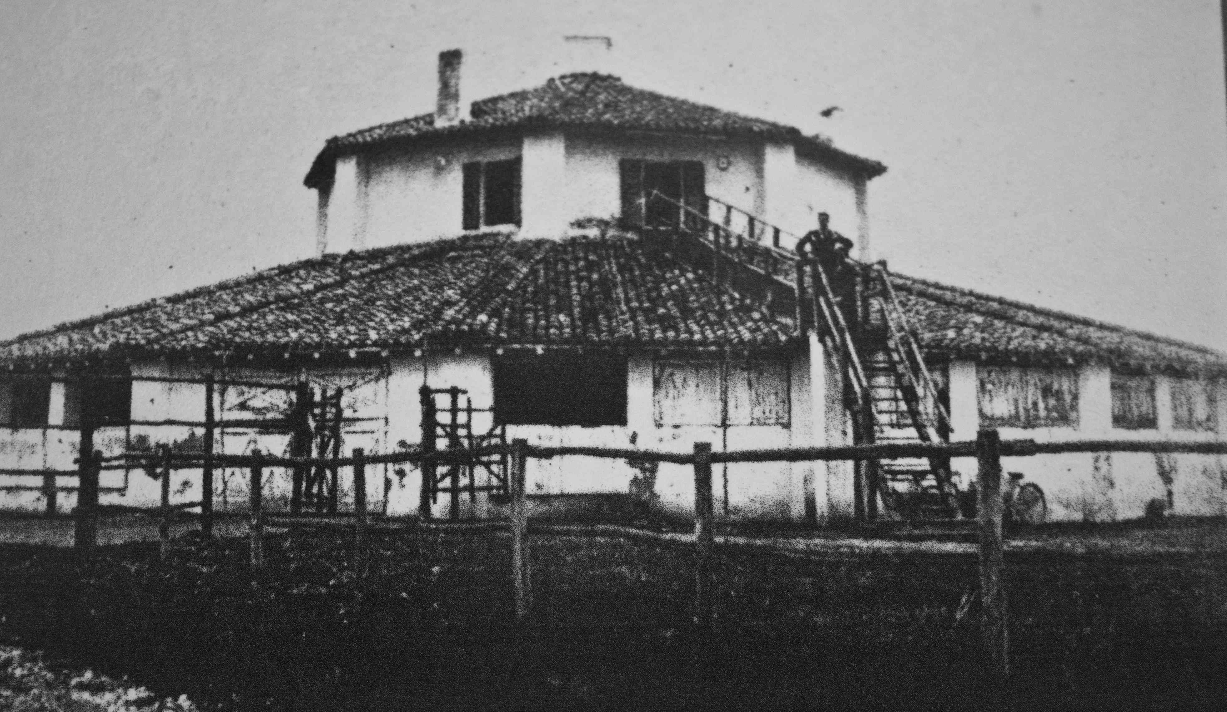 Il Barchessone Vecchio di San Matino Spino (Mirandola) con la scala esterna in legno, prima della realizzazione di quella in muratura nel 1954